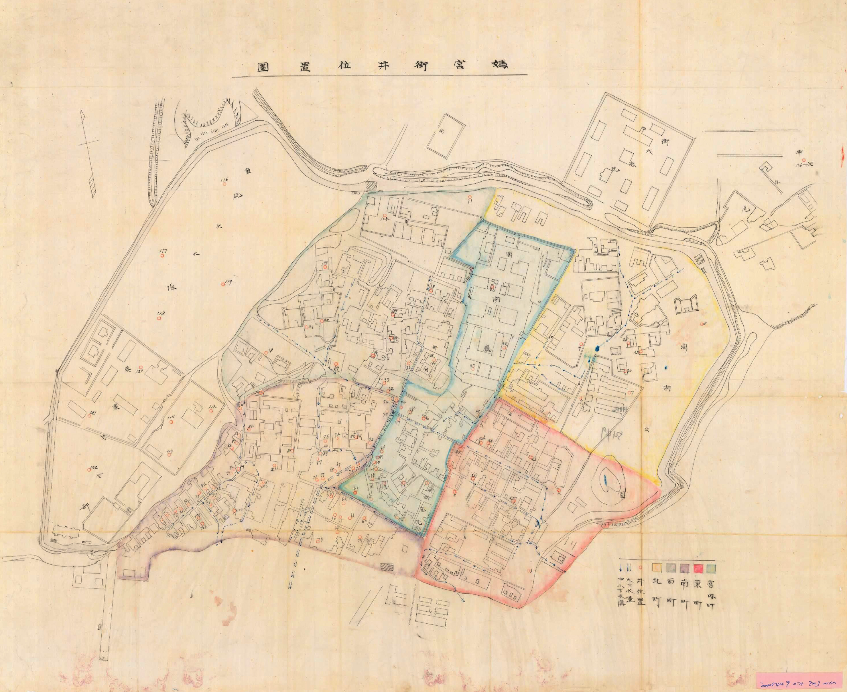 中文（台灣）: 澎湖聽媽宮街井位置圖，圖上商標示媽宮的五個通稱町名，分別為宮內町、北町、東町、南町、西町。